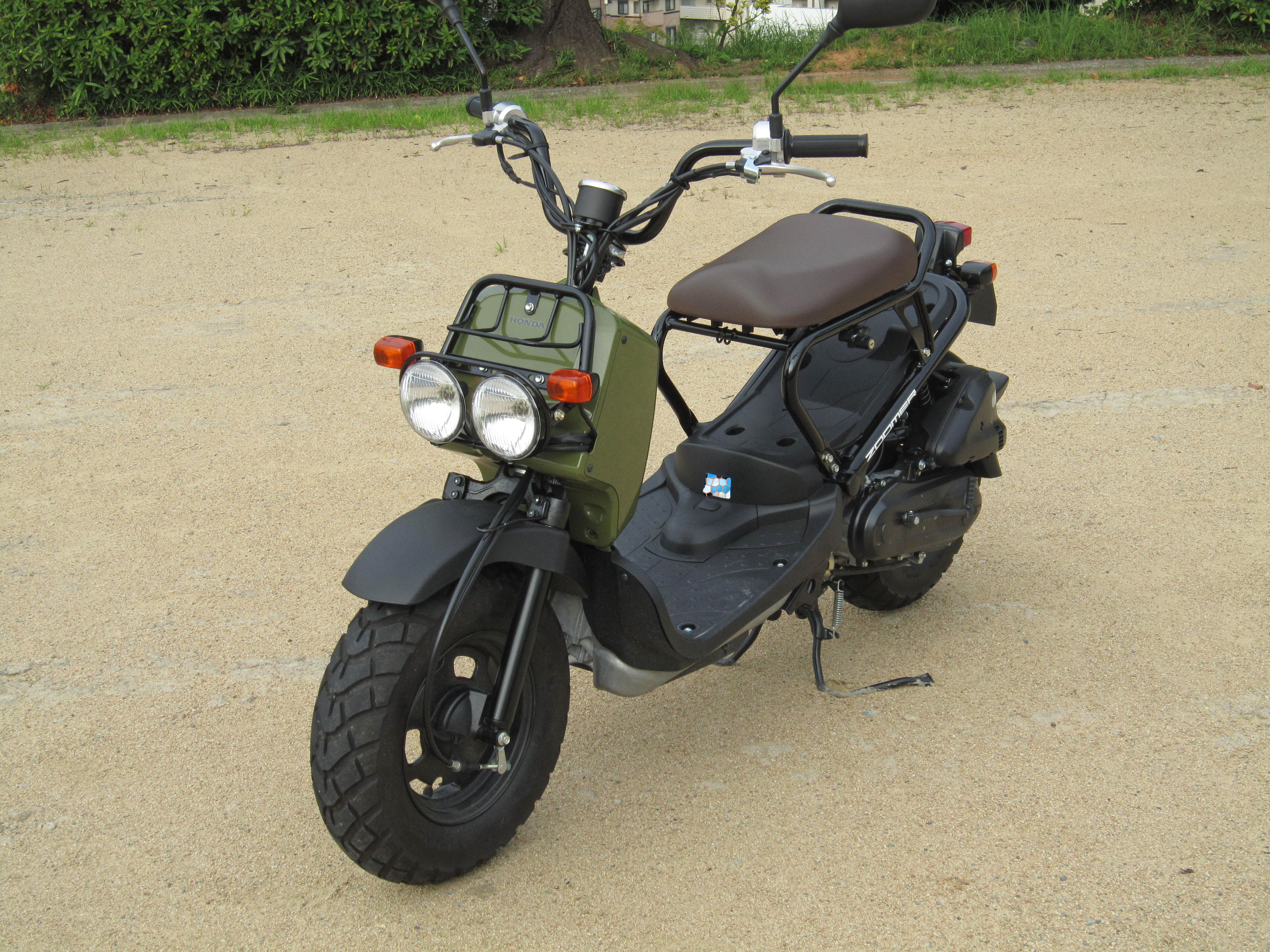 本田技研工業株式会社 ホンダ ズーマー2017年型モデル。